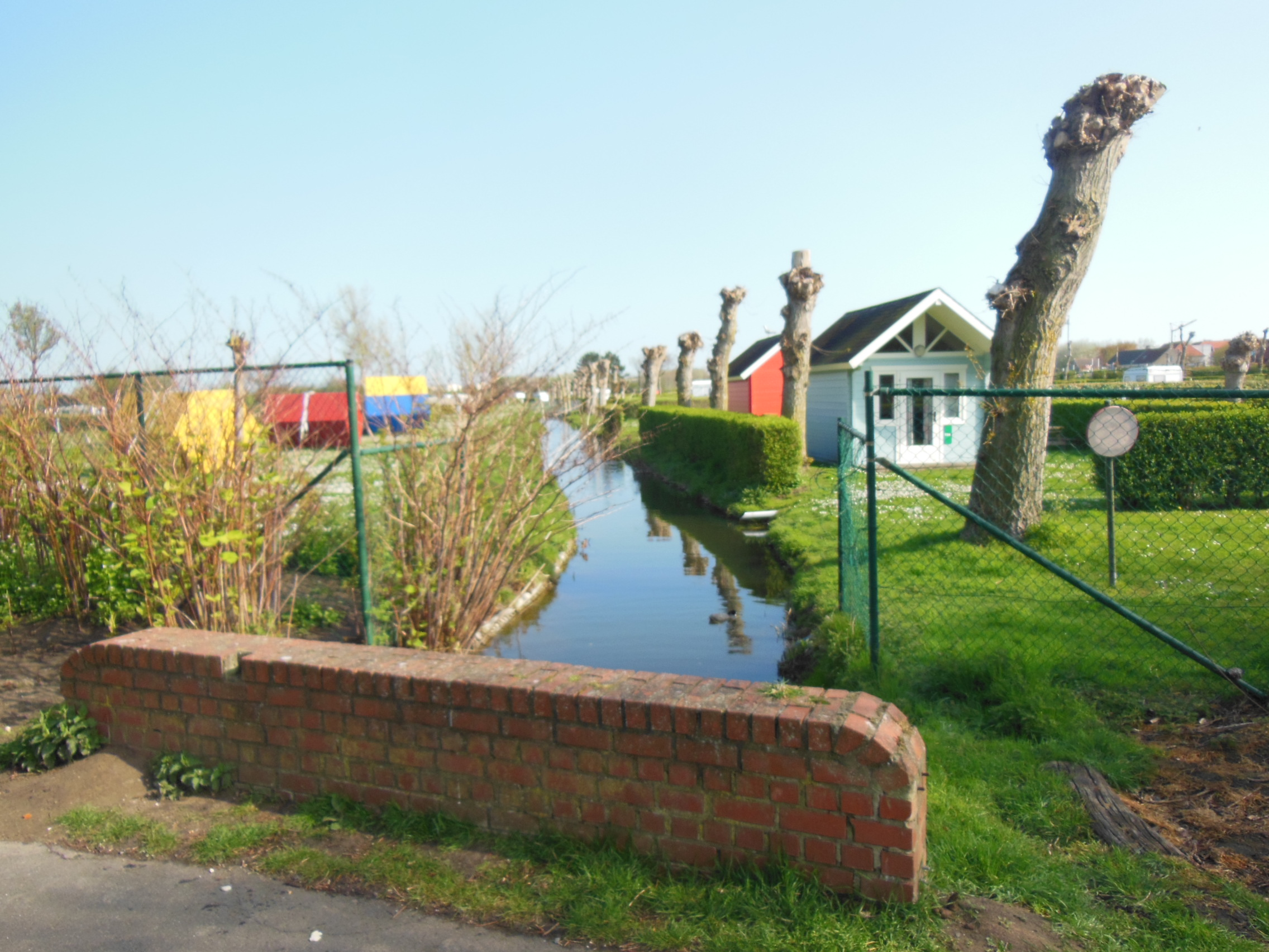 Het Geleed gezien richting noord, vanop de brug in de Strandjuttersdreef. Railing in bakstenen metselwerk, geknotte bomen en camping chalets